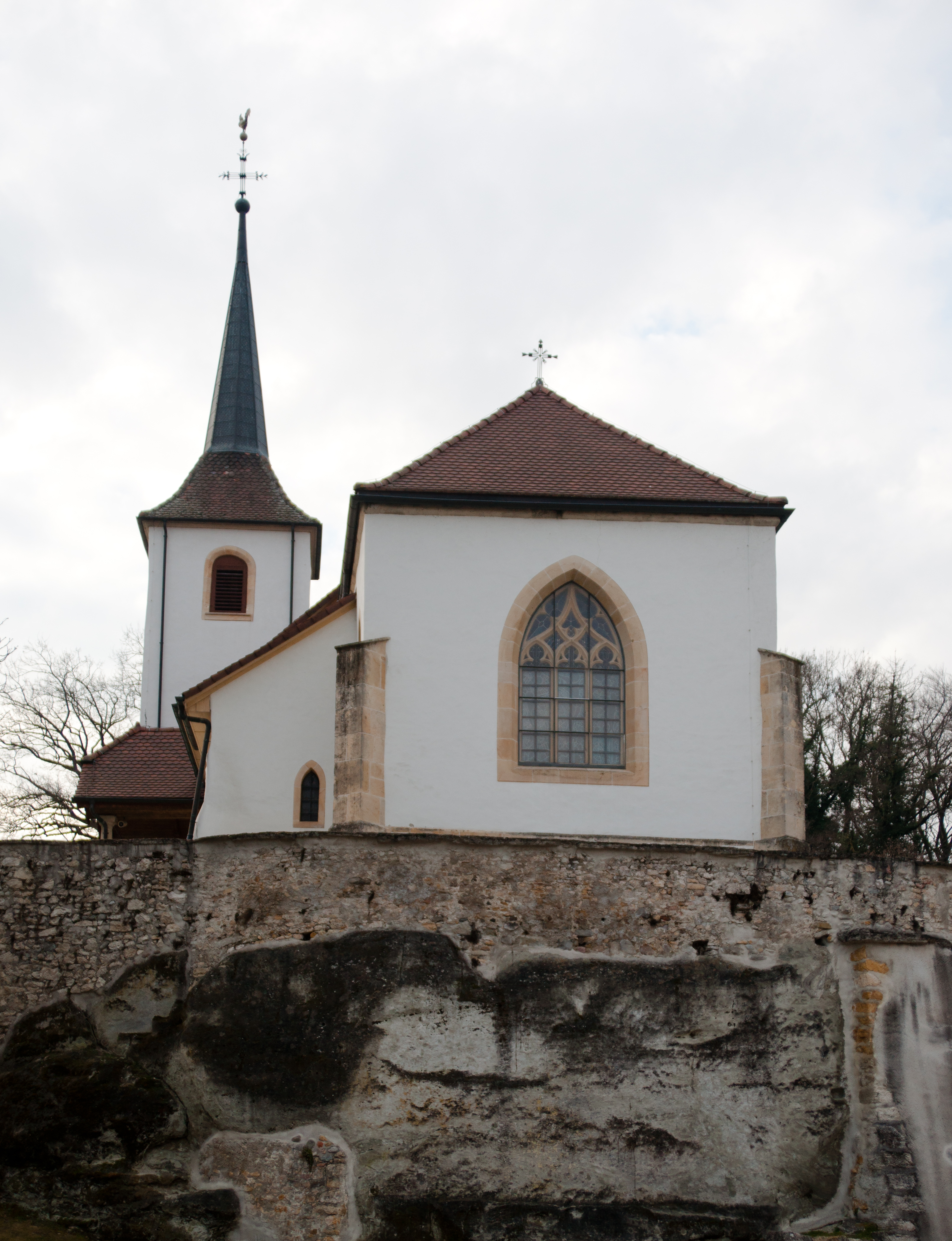 Eglise Saint-Pierre, Vallon